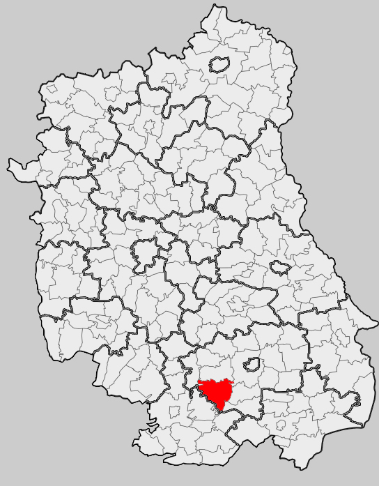 Map of gmina Zwierzyniec, Zamość county, Lublin voivodship Mapa gminy Zwierzyniec, powiat zamojski, województwo lubelskie